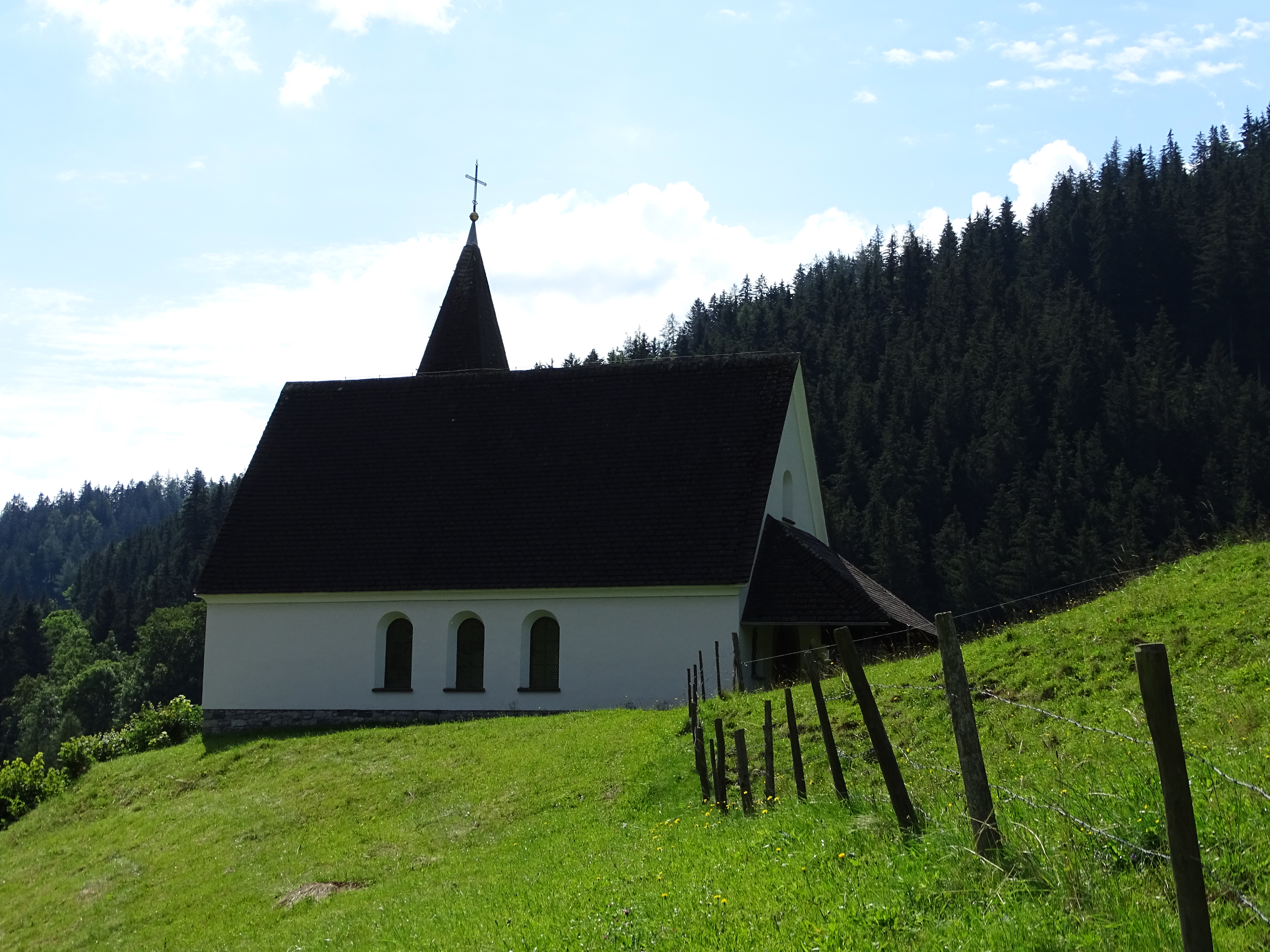 Die Kirche in Neuhof in der Gemeinde Übelbach